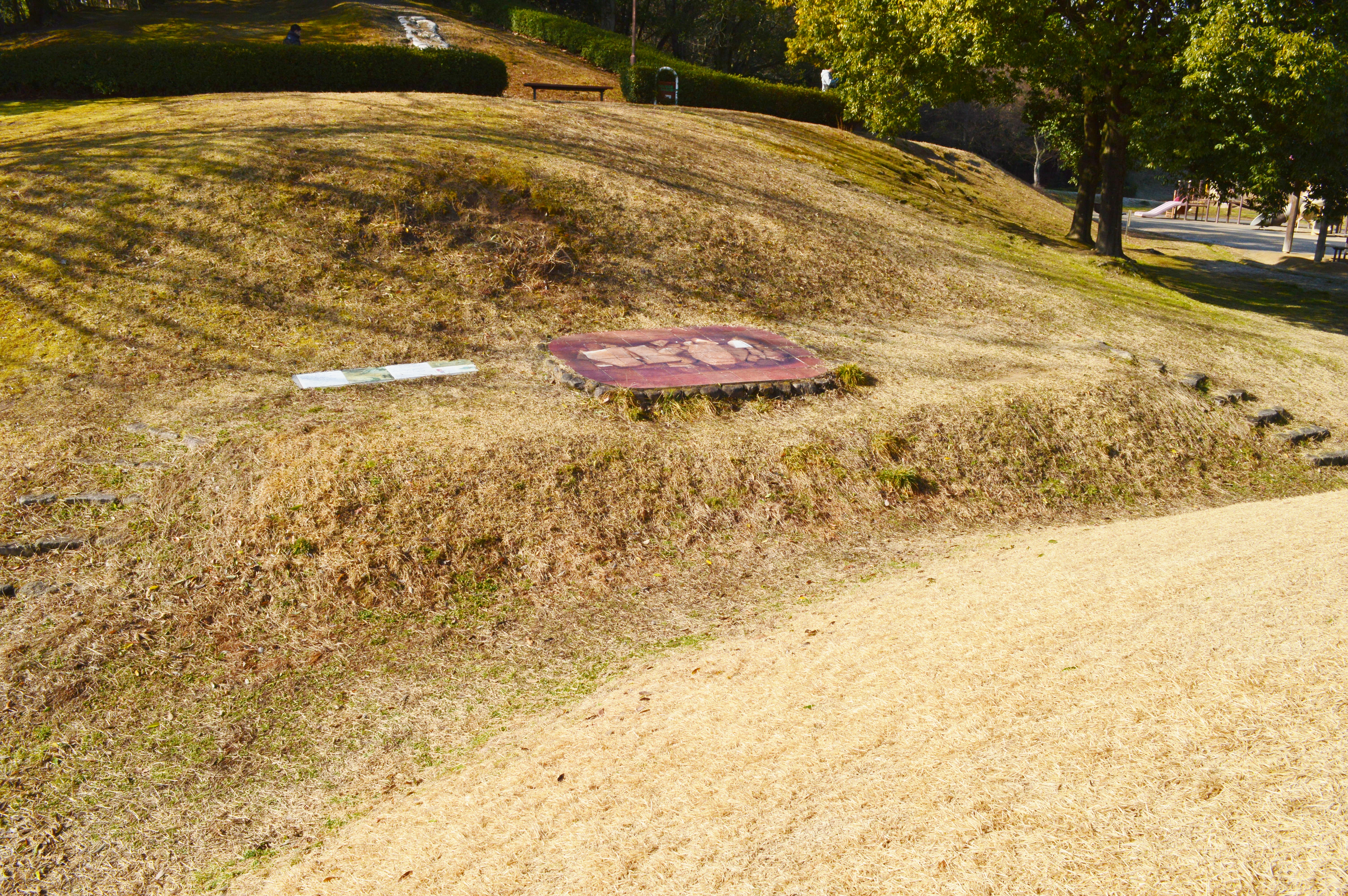 三ツ城3号墳 墳丘